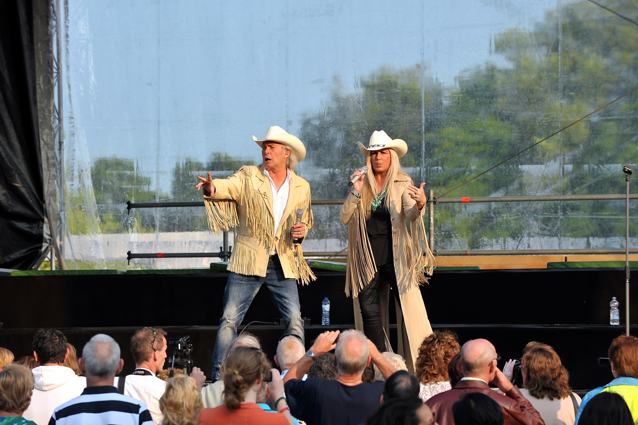 Dominic Grant en Julie Forsyth tijdens hun optreden op het Bodega Norton Culinair Festival 2013.